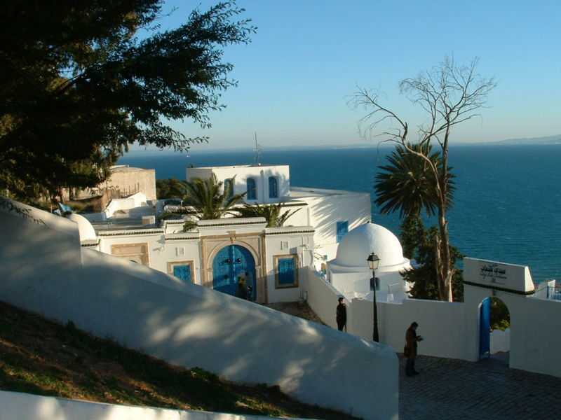 Photographie personnelle prise à Sidi Bou Saïd, avec notamment l'entrée du café Sidi Chabaane